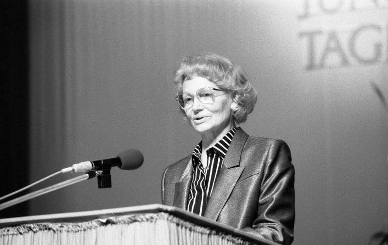 Potsdam, 40. Jahrestag Pädagogischer Hochschule ADN-ZB/Reiche/19.10.88/Potsdam: Pädagogische Hochschule Dr. h.c. Margot Honecker, Mitglied des ZK der SED und Minister für Volksbildung, während ihrer Festrede anläßlich des 40jährigen Bestehens der Pädagogischen Hochschule "Karl Liebknecht" Potsdam. Die Festveranstaltung fand im Hanns-Otto-Theater statt. Abgebildete Personen: Honecker, Margot: Ministerin für Volksbildung, SED, DDR (GND 122782933)